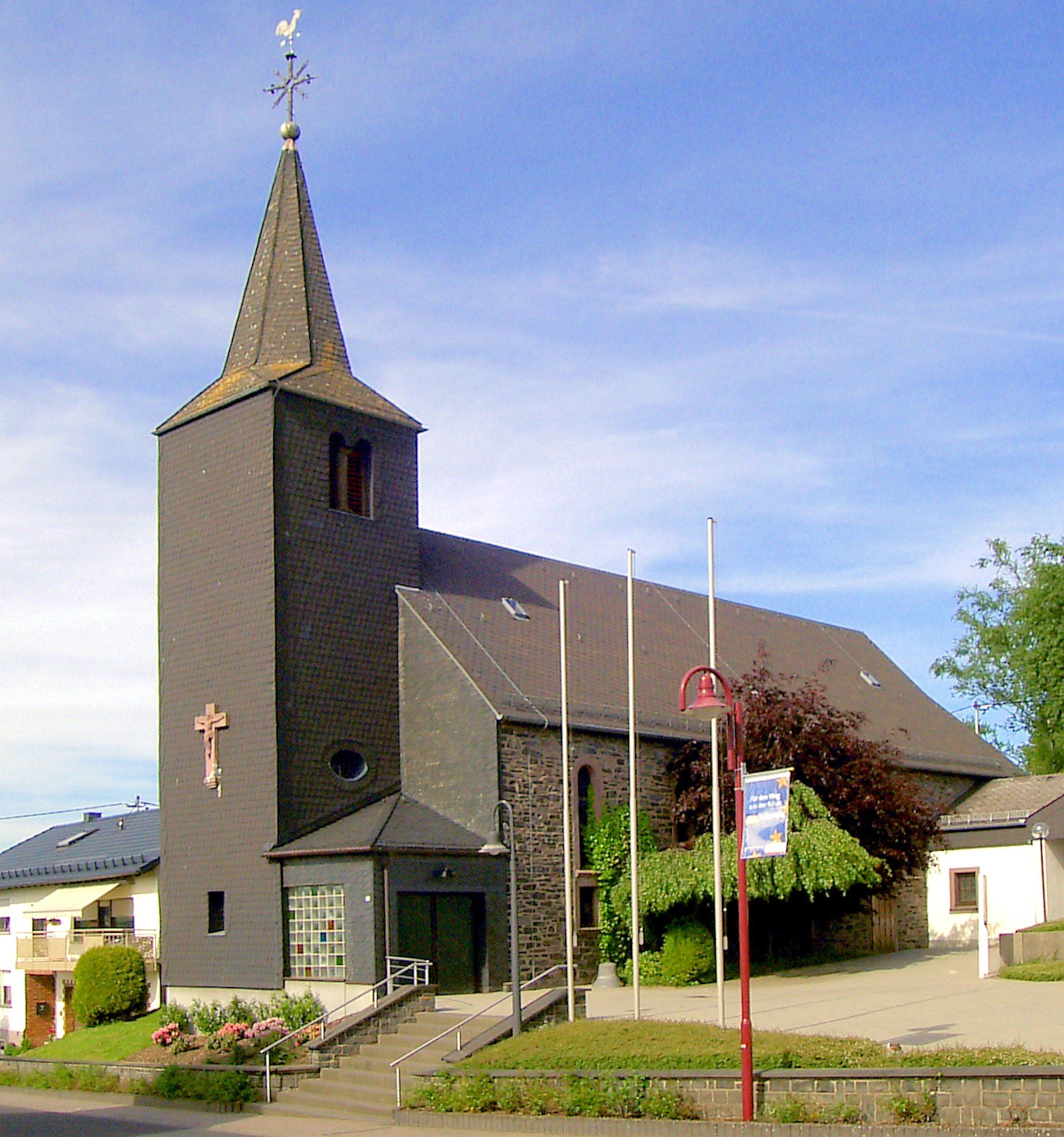 katholische Kirche Mariä Himmelfahrt in Neustadt/Westerwald, Westerwaldkreis, Rheinland-Pfalz, Deutschland